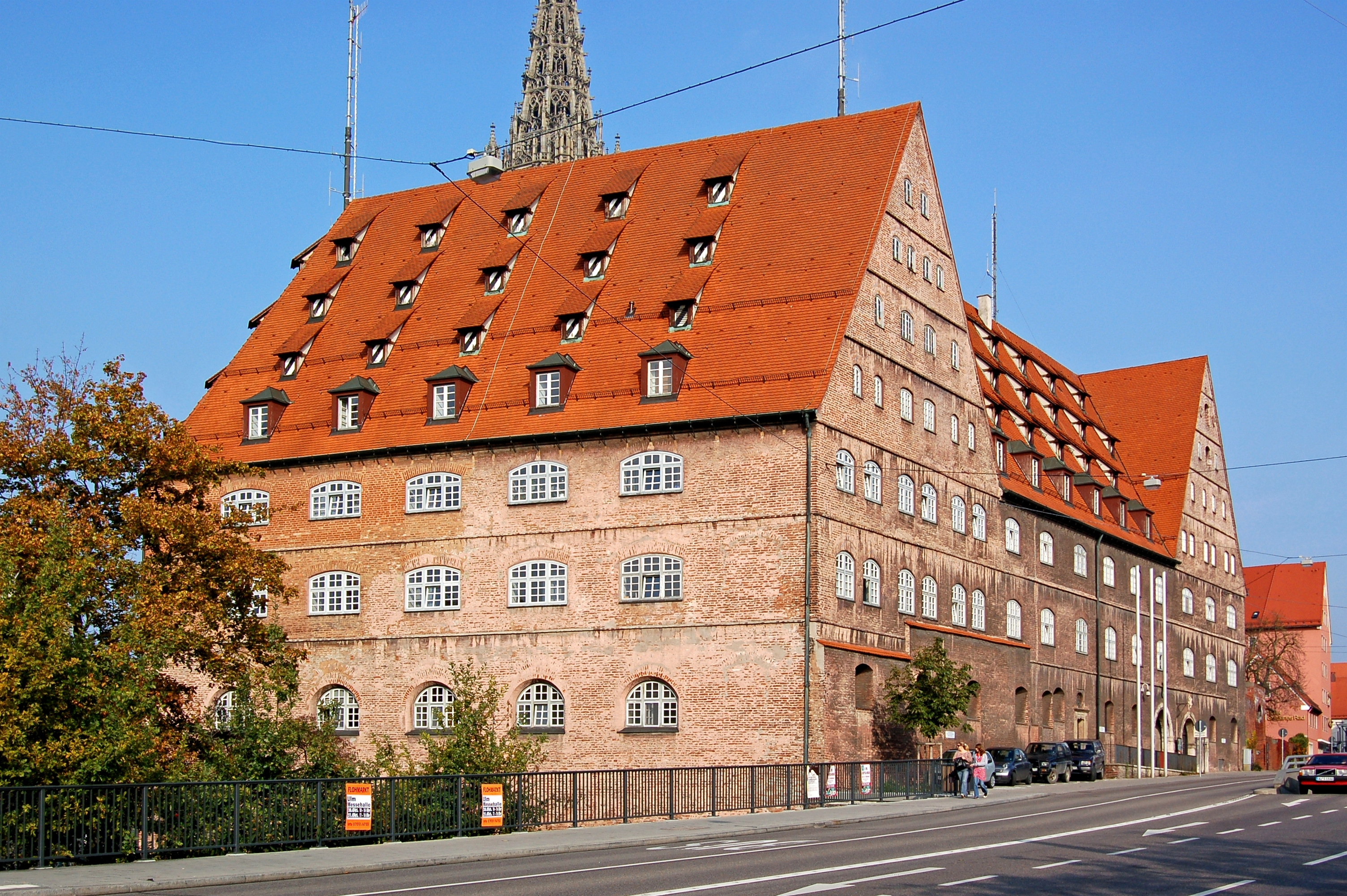 Imposanter Backsteinbau in der Innenstadt.